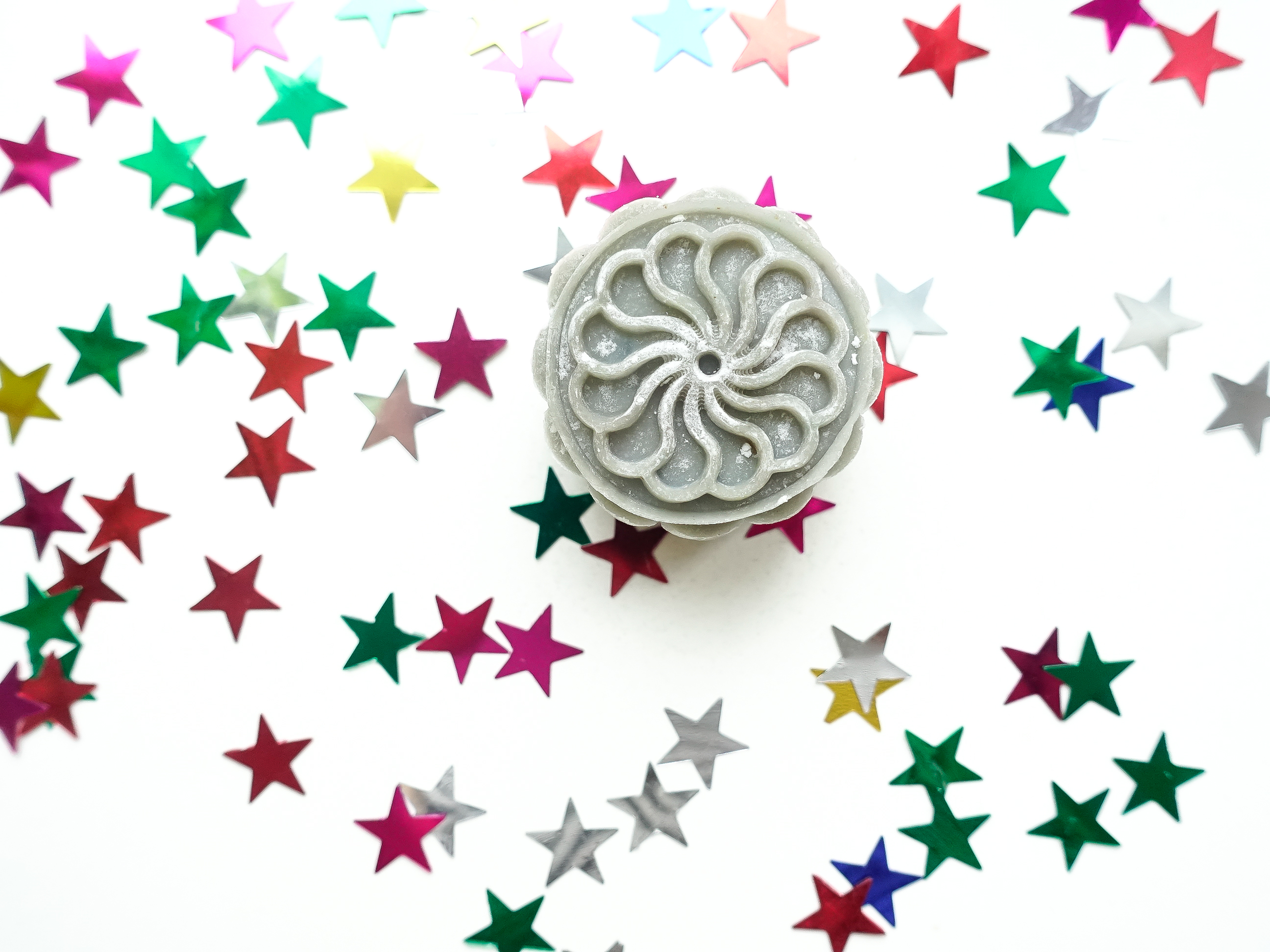 Сноу-скін мункейк із сучасним варіантом начинки: лаванда з кокосом. Виробник - PapaDoci